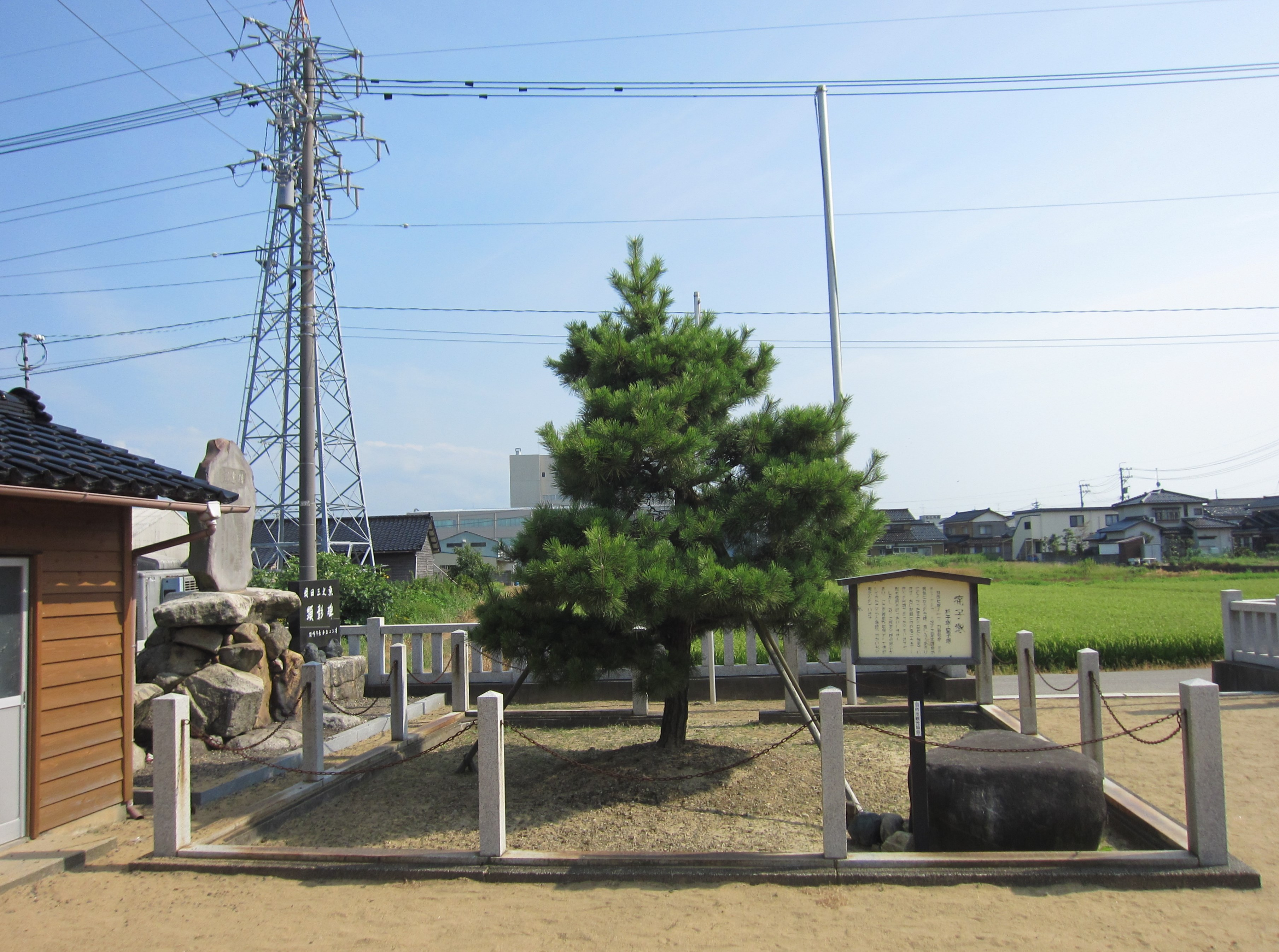 痛子塚 (羽咋七塚)